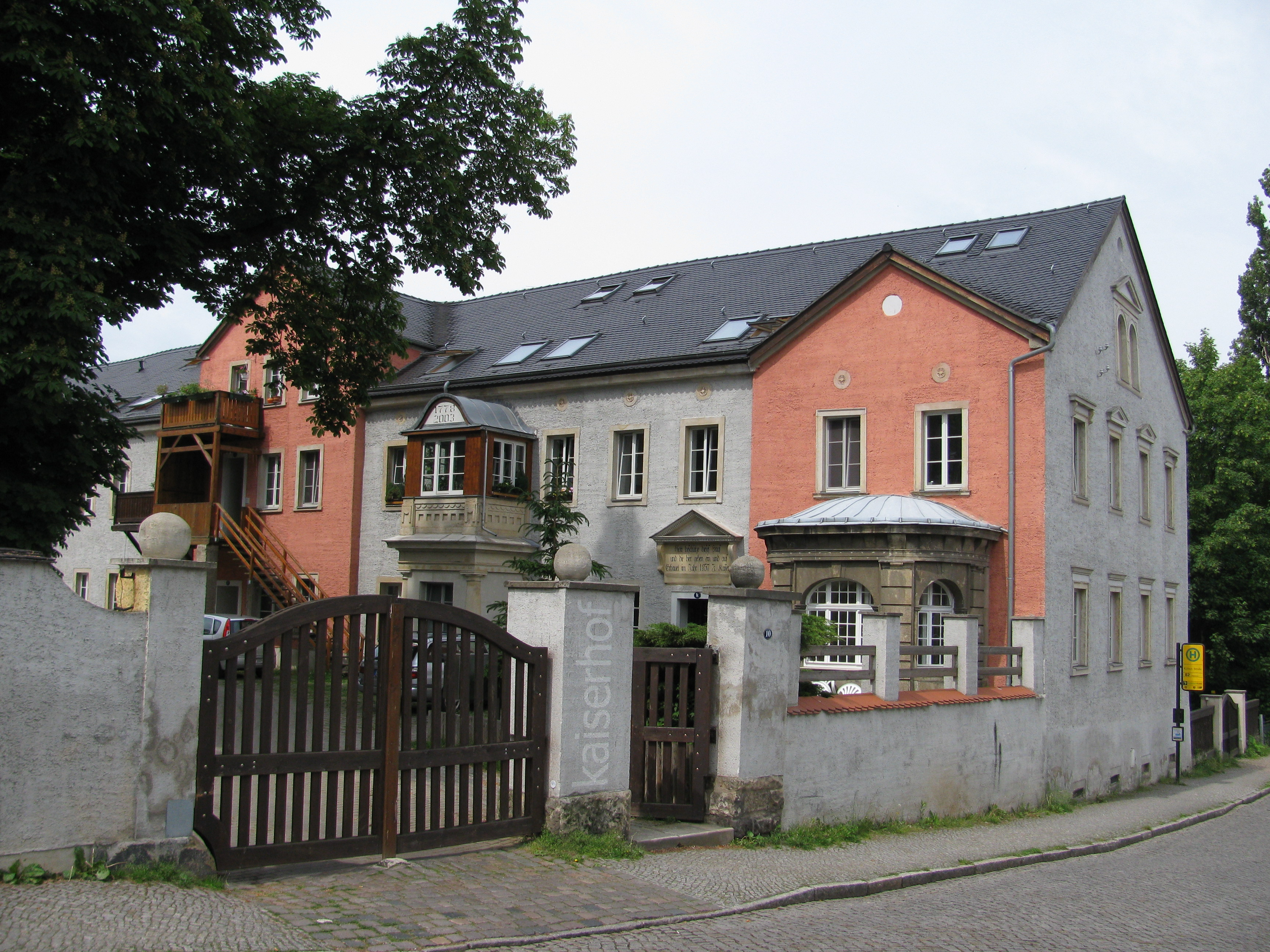 Kaiserhof im Dorfkern von naußlitz, Stadtteil von Dresden